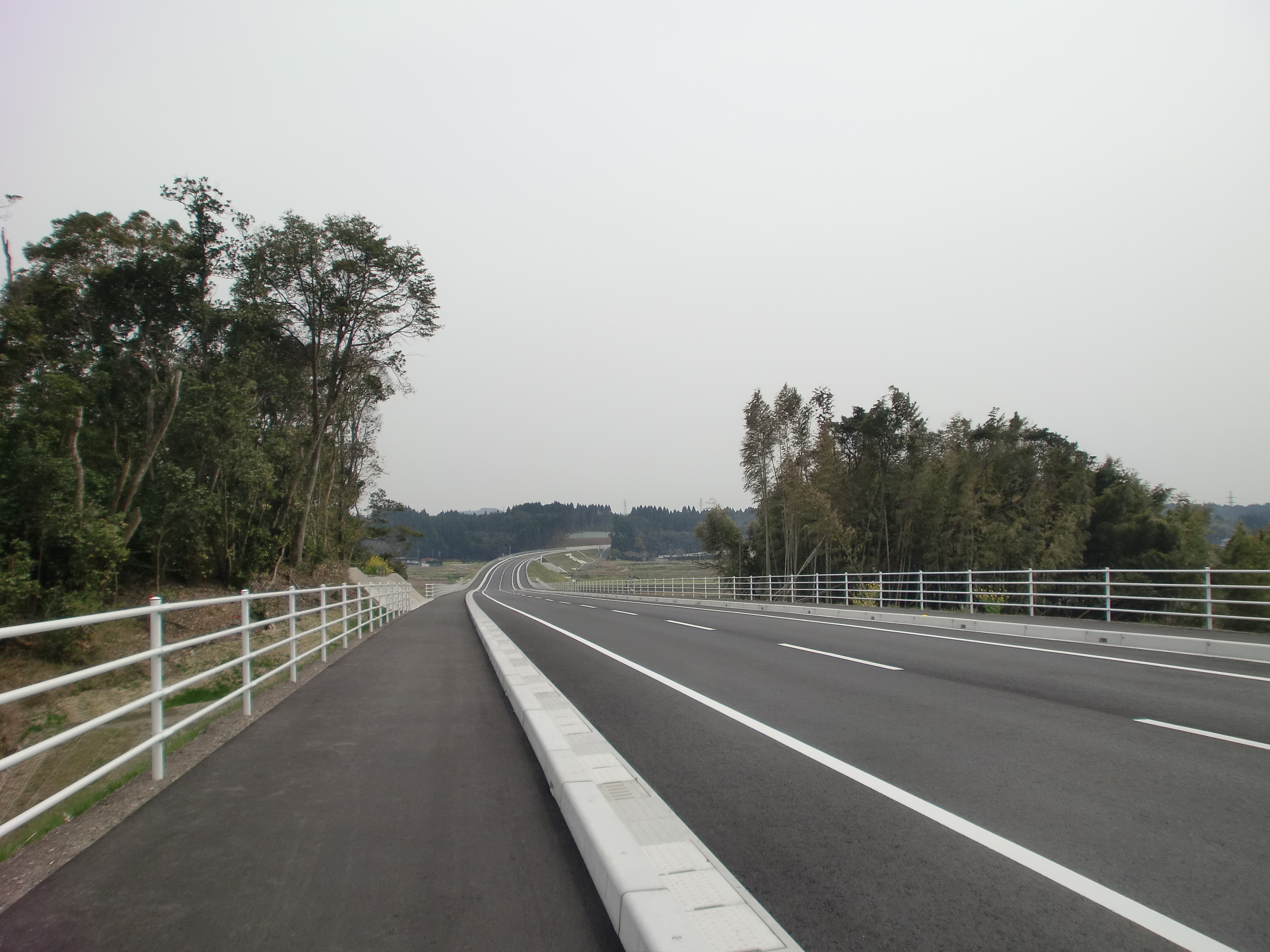 南薩縦貫道を知覧交差点から瀬世交差点（一般道区間）に望む